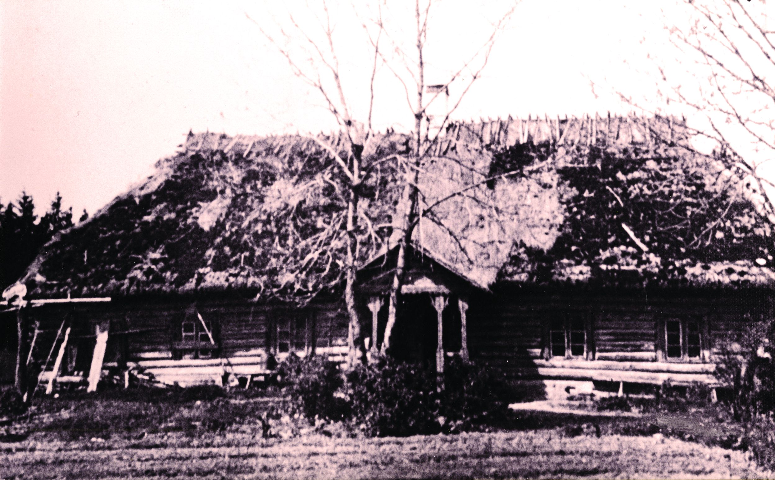 Foto majast, kus Ruila kool asus 1871-1916